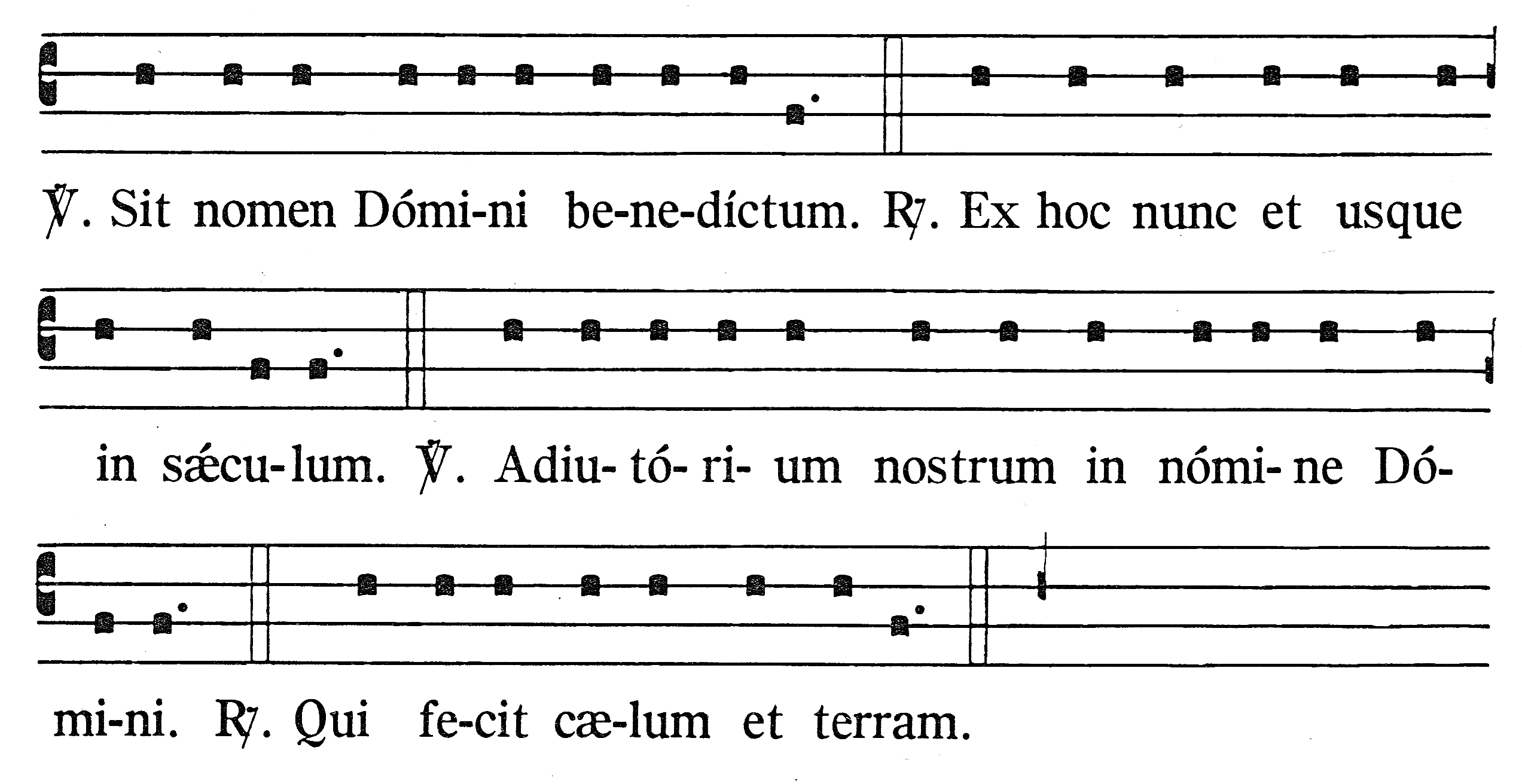 Sit nomen Domini benedictum Versikel beim bischöflichen Segen (Ad benedictionem episcopalem) Quelle: Graduale Romanum, Solesmes MCMLXXIX, S. 820